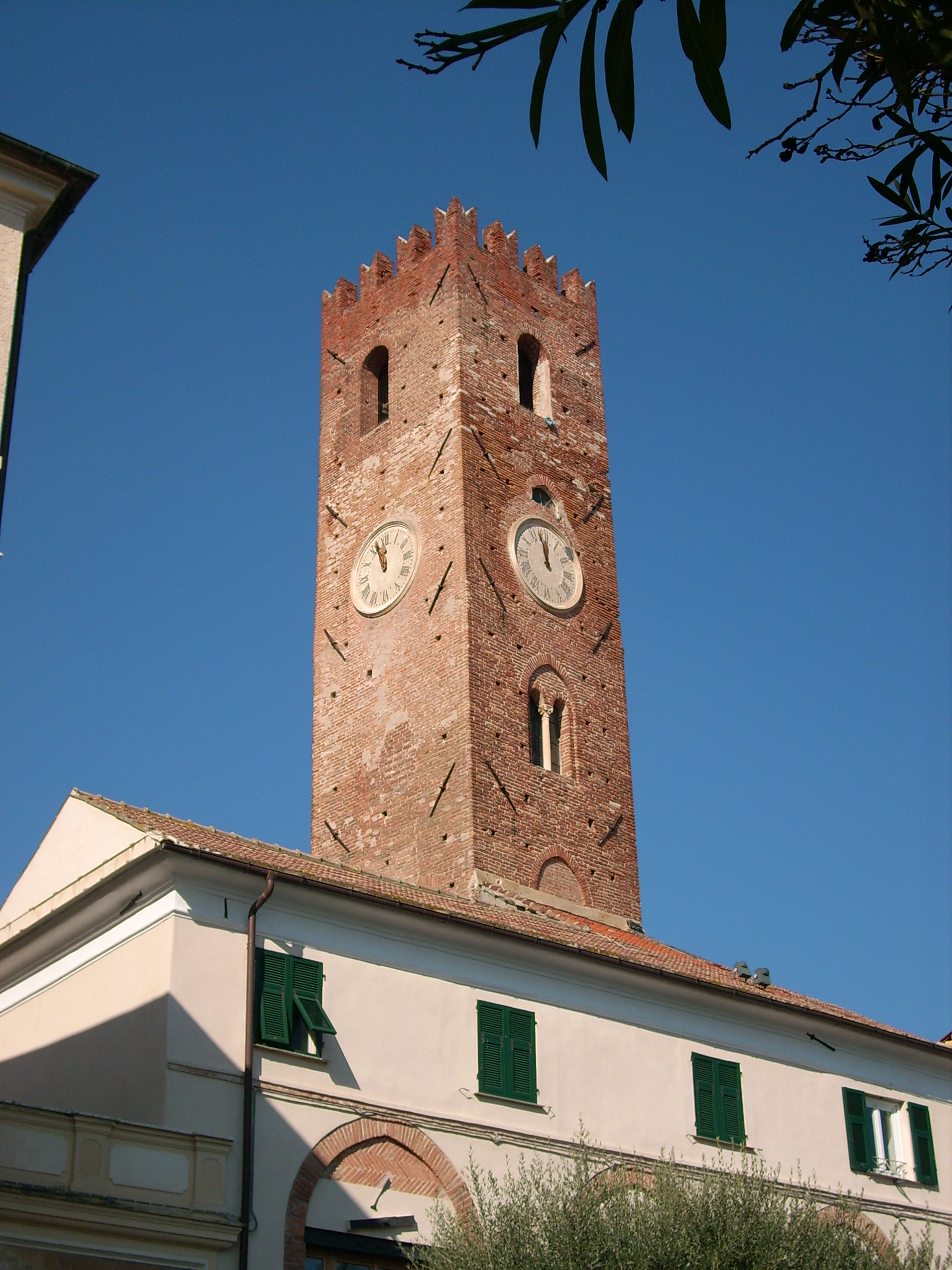 Torre di Noli, Liguria, Italy